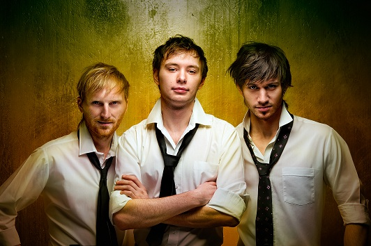 Фотосессия группы "Predict". Изображение взято с личного разрешения автора.